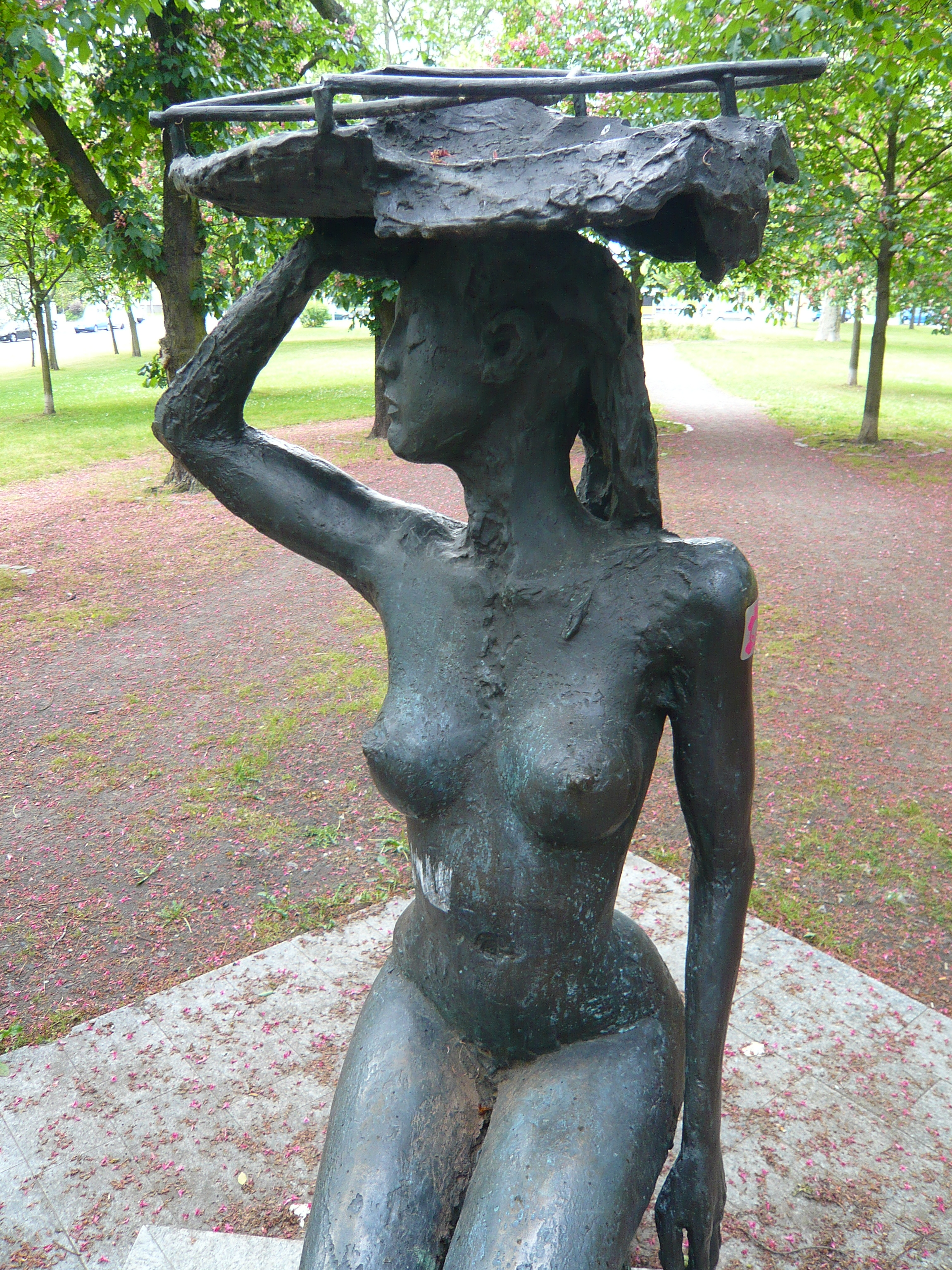 Skulptur Knieende Dame mit Schale, genannt "Nackte vom Ostseeplatz", Anna Franziska Schwarzbach, 1987; auf dem Ostseeplatz, Berlin-Prenzlauer Berg